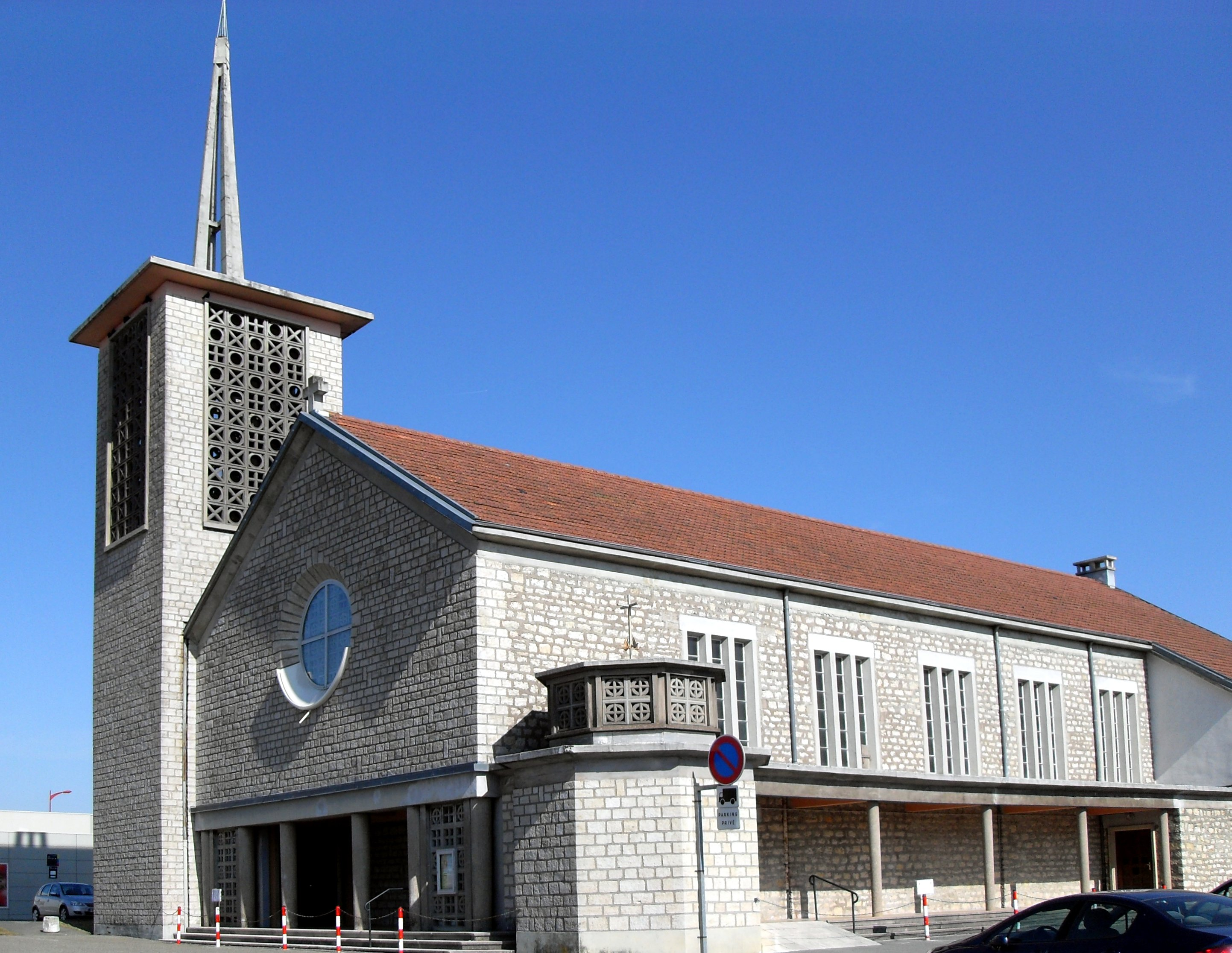 L'église Notre-Dame-de-la-Paix à Montreux-Château